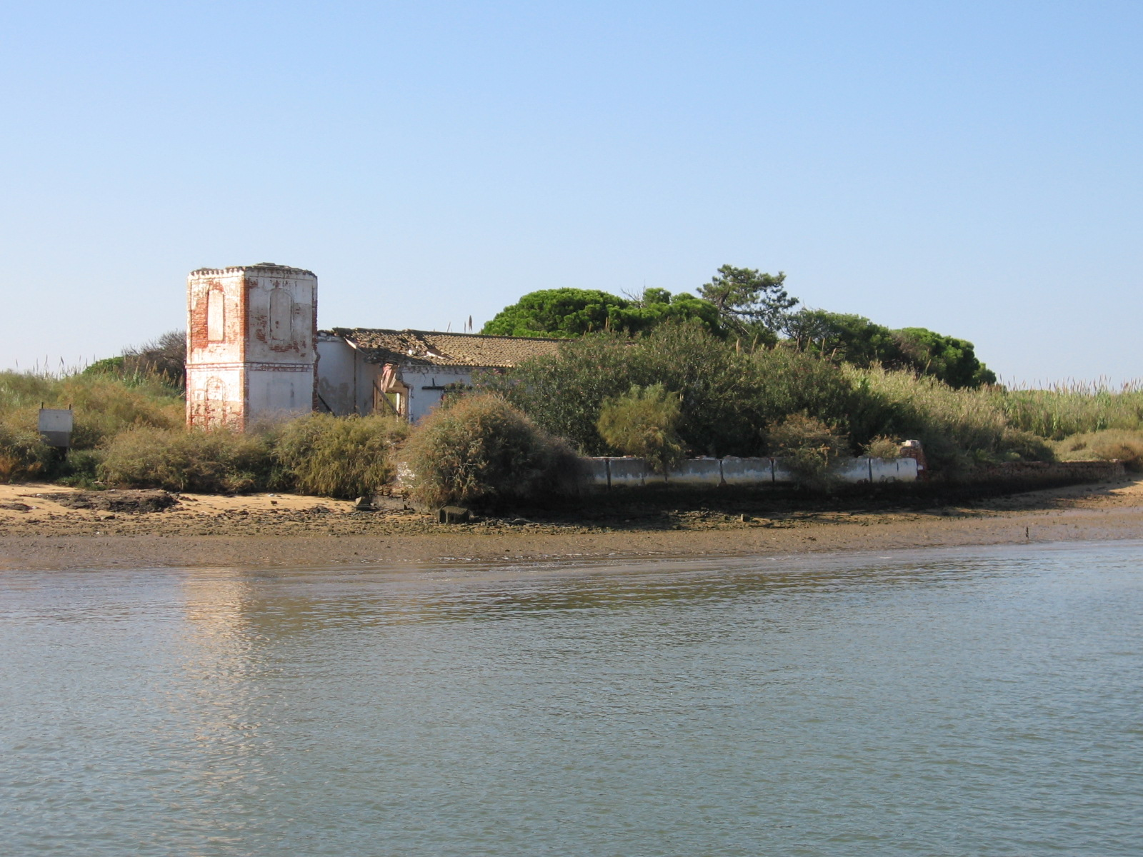 Casa del Capitán del Real Nuevo de la Almadraba de Nueva Umbría (Lepe)